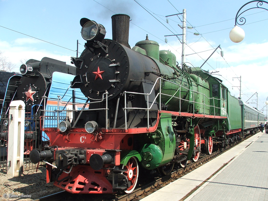 Ретро-поезд в Ростове-на-Дону